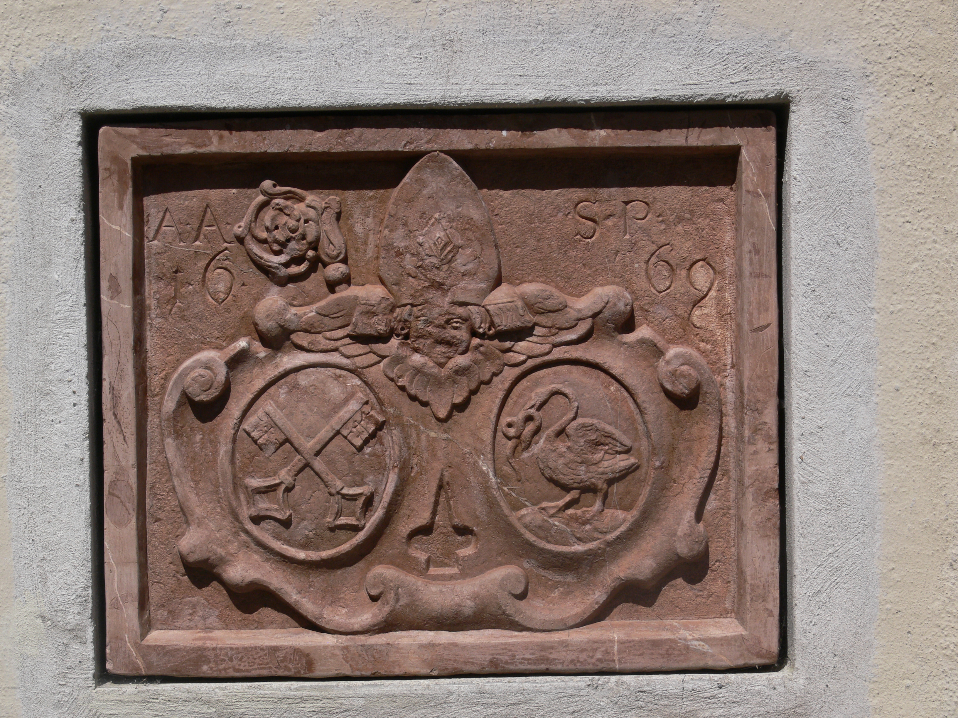 Petersfriedhof SalzburgWappen von Abt Amandus Pachler